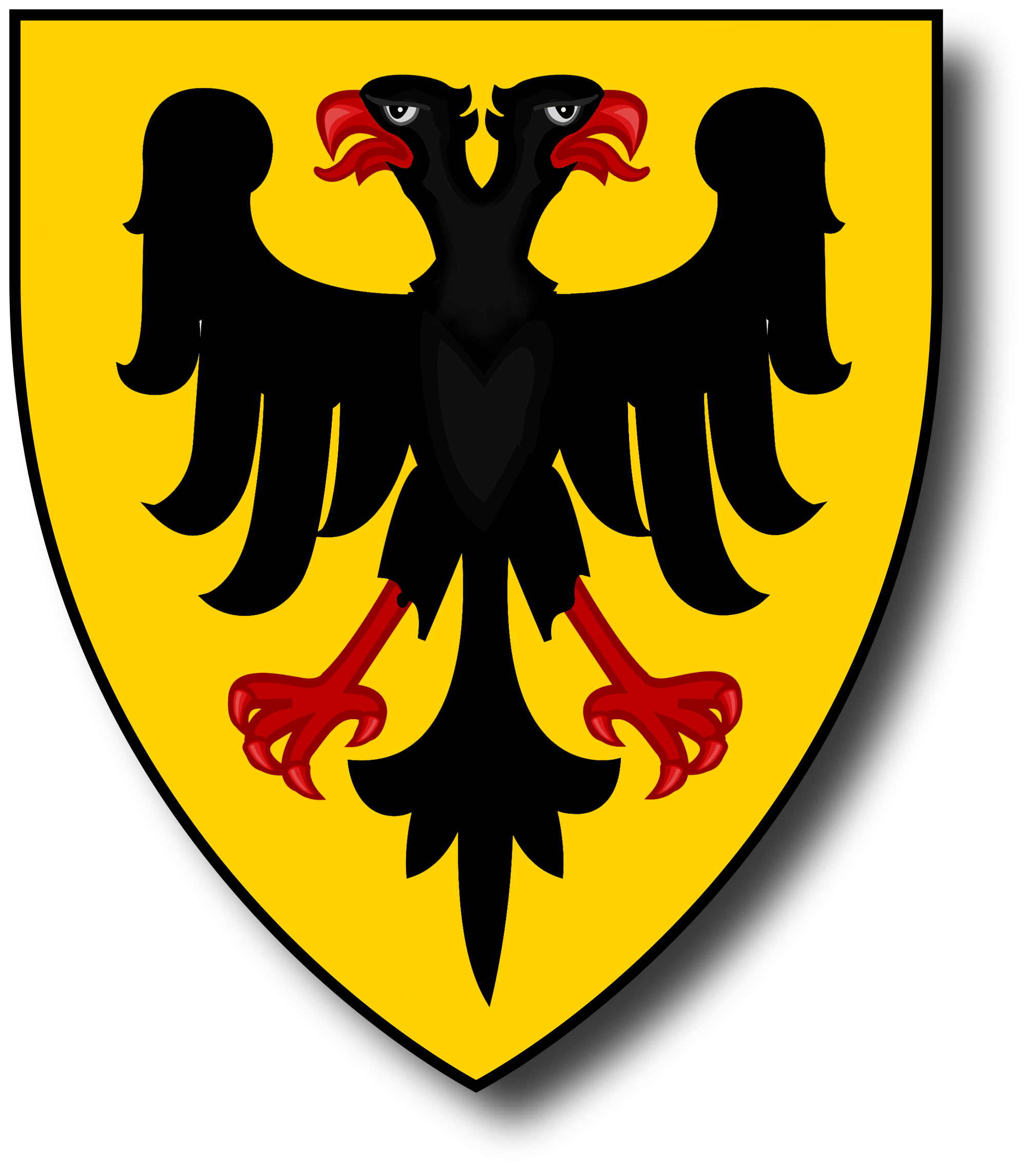 Balogh pajzs